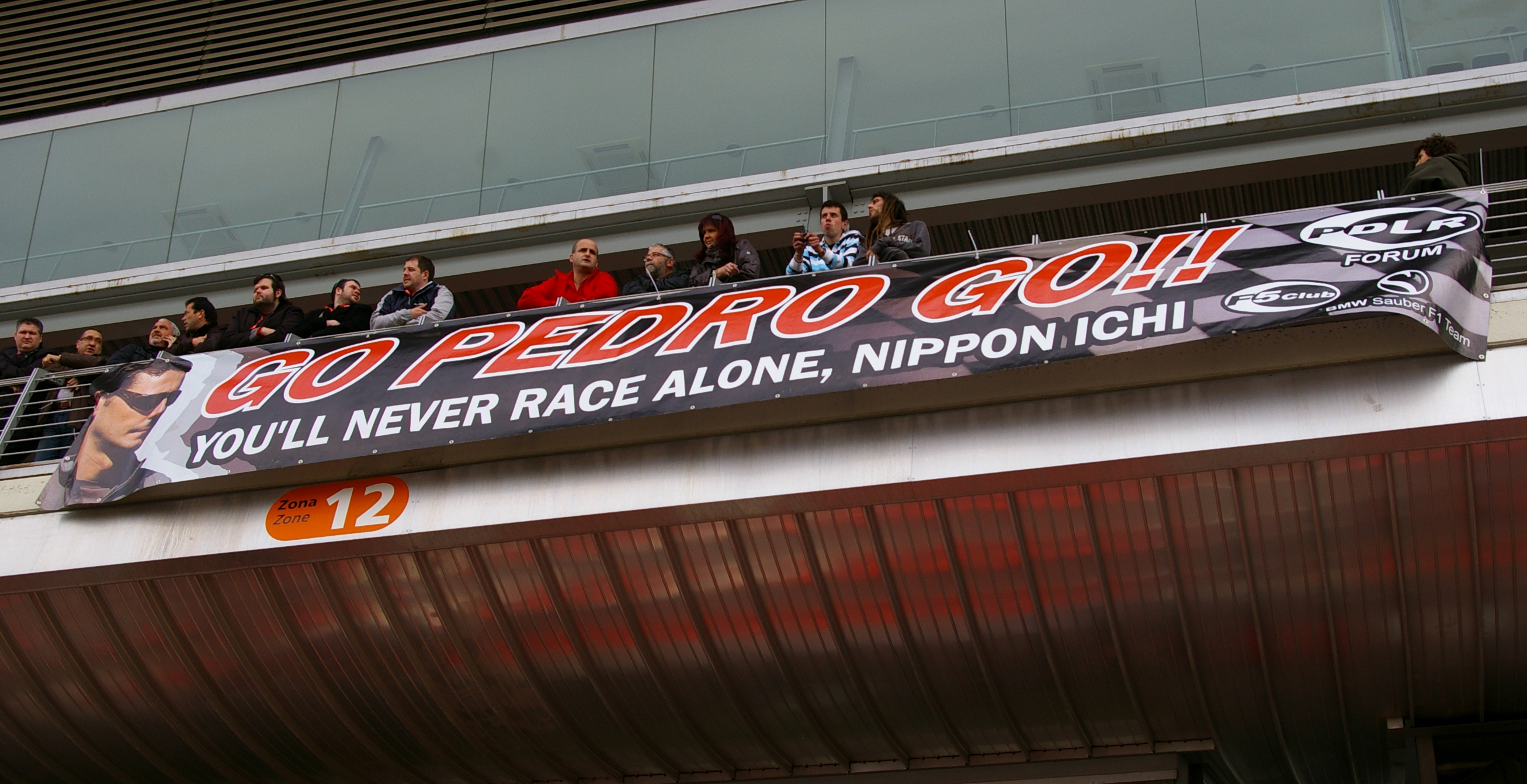 Pancarta de suport a Pedro de la Rosa durant els entrenaments al Circuit de Catalunya